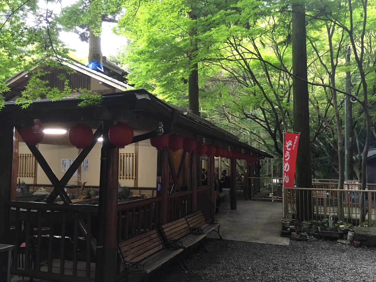 保内町宮内両家地区。壇ノ浦の戦いで敗れた平家の落人の悲しい伝説が残る。夏季限定で流しそうめんも営業しています。